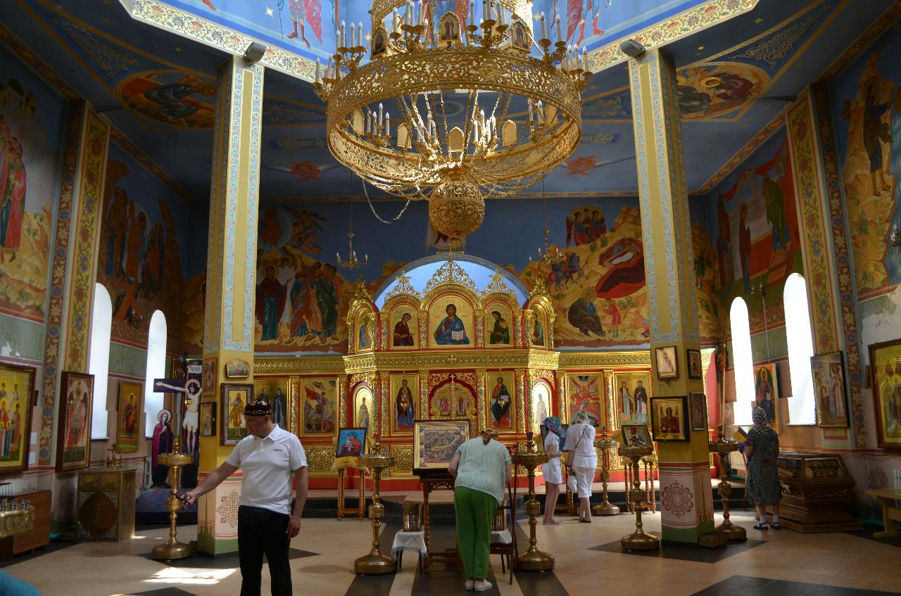 Грозный, Чеченская республика, 26.06.2019. Автобусная экскурсия из Пятигорска